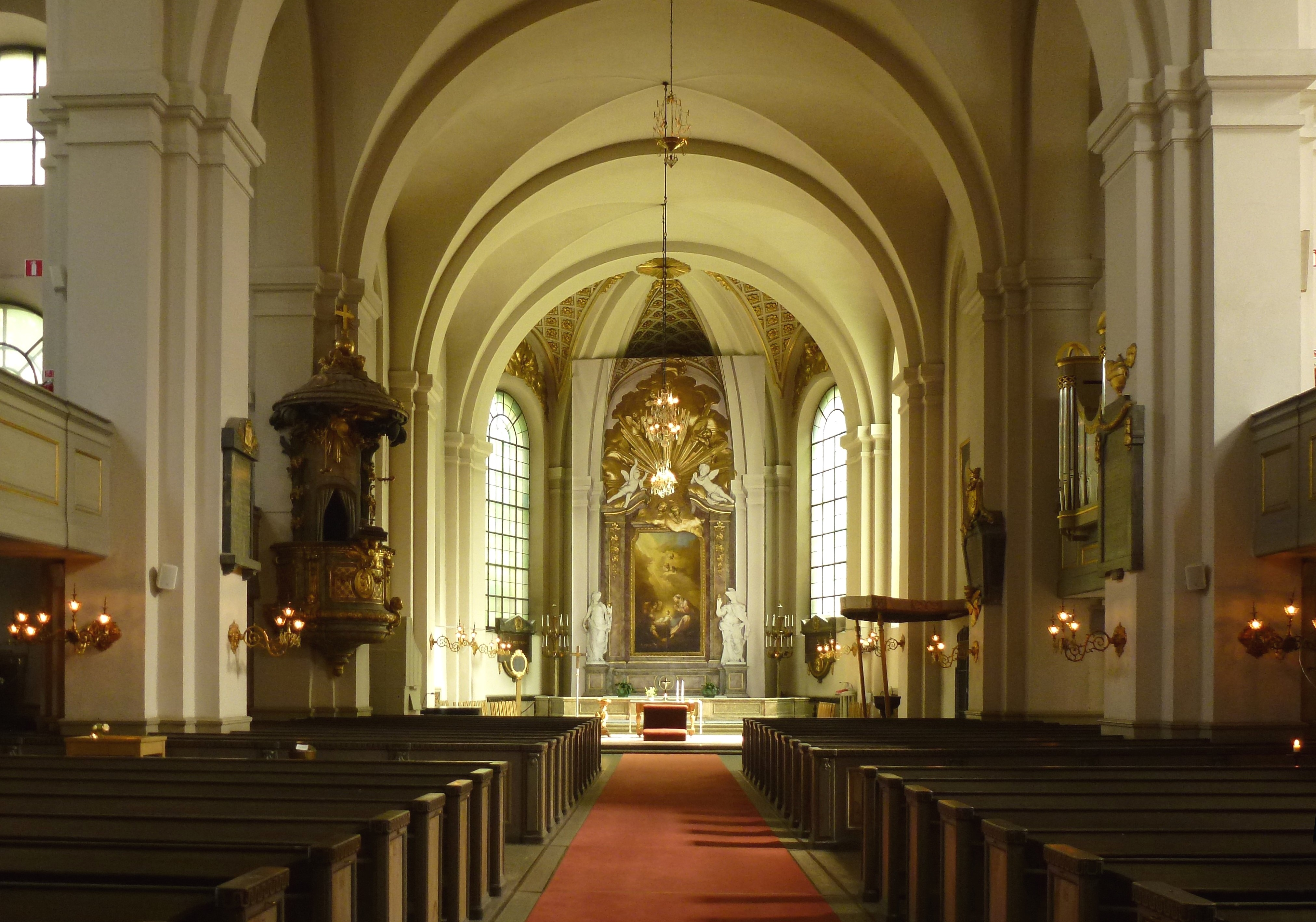 Maria Magdalena kyrka, altargången